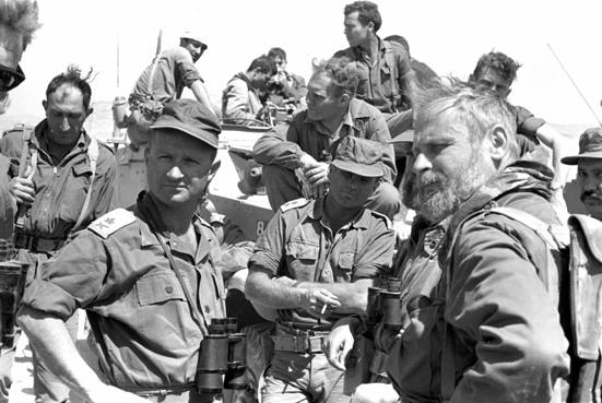 פעולת "כראמה", מבצע "תופת". בתמונה נוכחים- הקצח"ר אל"מ אהרון דוידי, סא"ל טוביה (טיבי) שפירא, מפקד המבצע אלוף פיקוד מרכז אלוף עוזי נרקיס, סא"ל משה לוי. מימין לשמאל: הקצח"ר אל"מ אהרון דוידי, מג"ד נח"ל מוצנח סא"ל טוביה (טיבי) שפירא בשמאלו סיגריה. מפקד המבצע אלוף פקוד מרכז אלוף עזי נרקיס, סא"ל משה לוי סמח"ט הבקעה (?), מאחורי שפירא ללא קסדה אברהם ברעם מפקד כח משנה של הטנקים (זיהויו בספק).